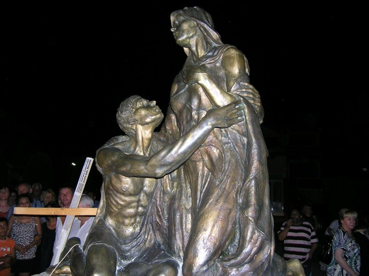 Споменик Децата Бегалци Струмица